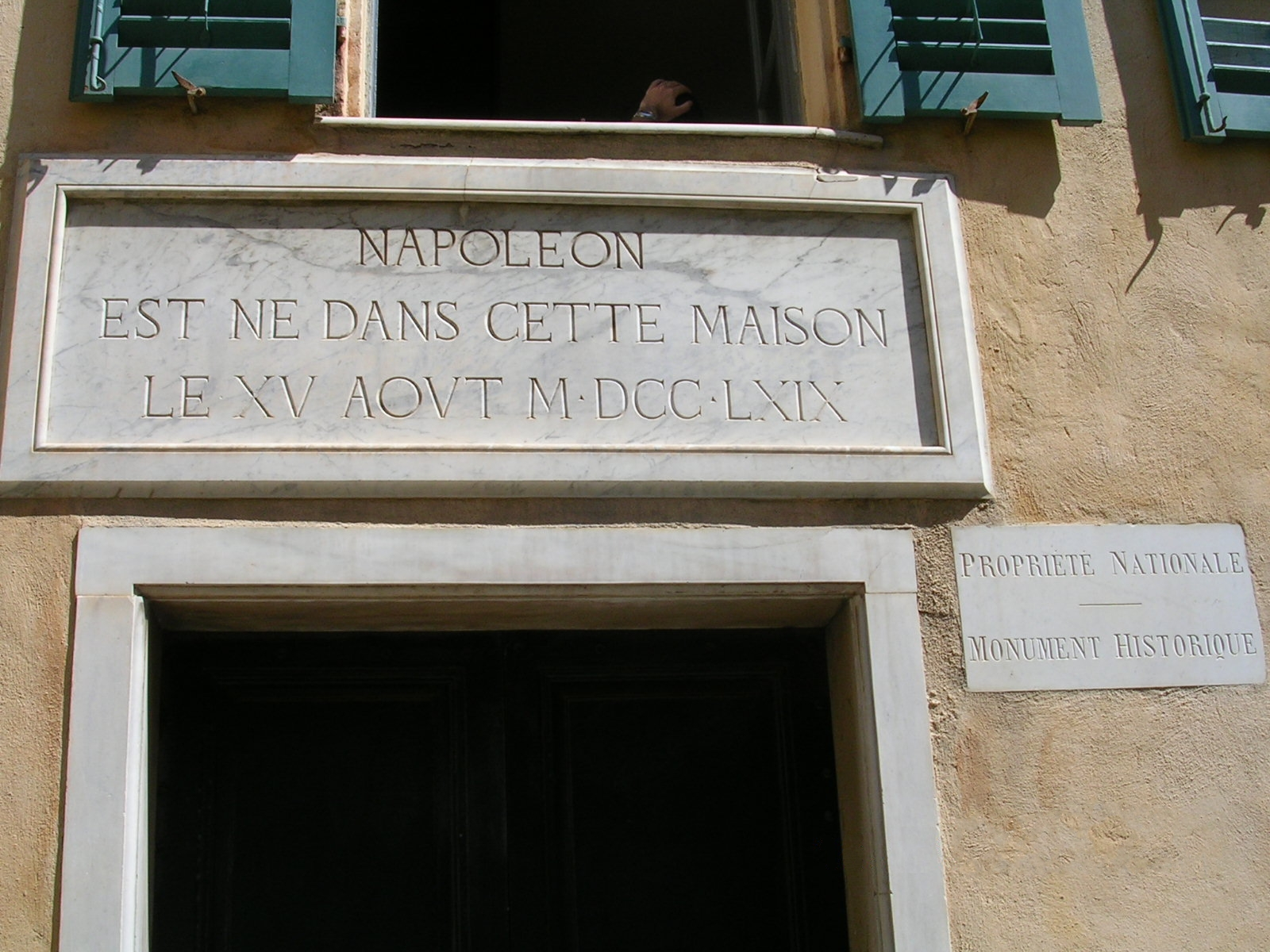 Ajaccio (Corse-du-Sud, France)